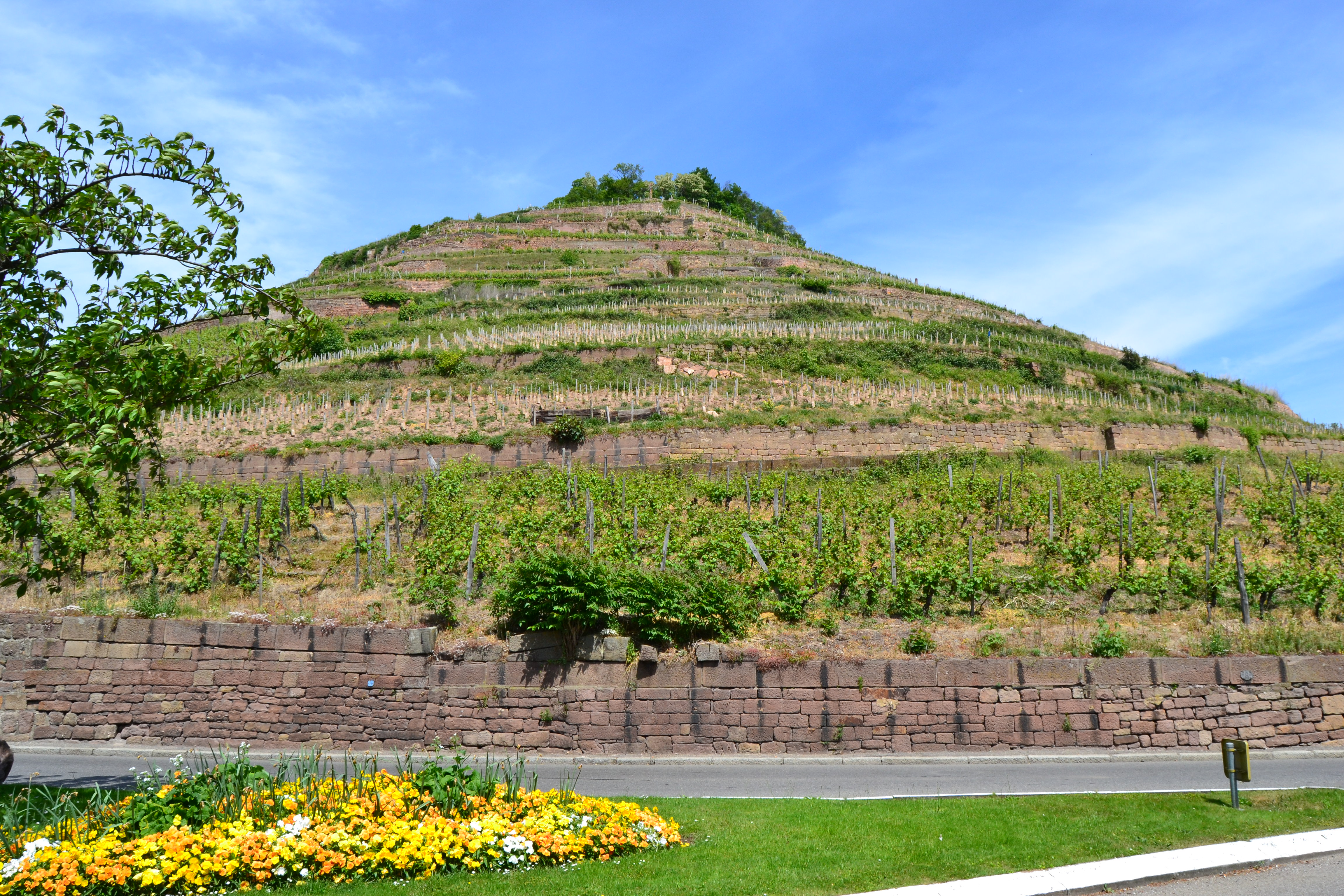 Guebwiller, le vignoble grand cru kitterlé, Alsace, France